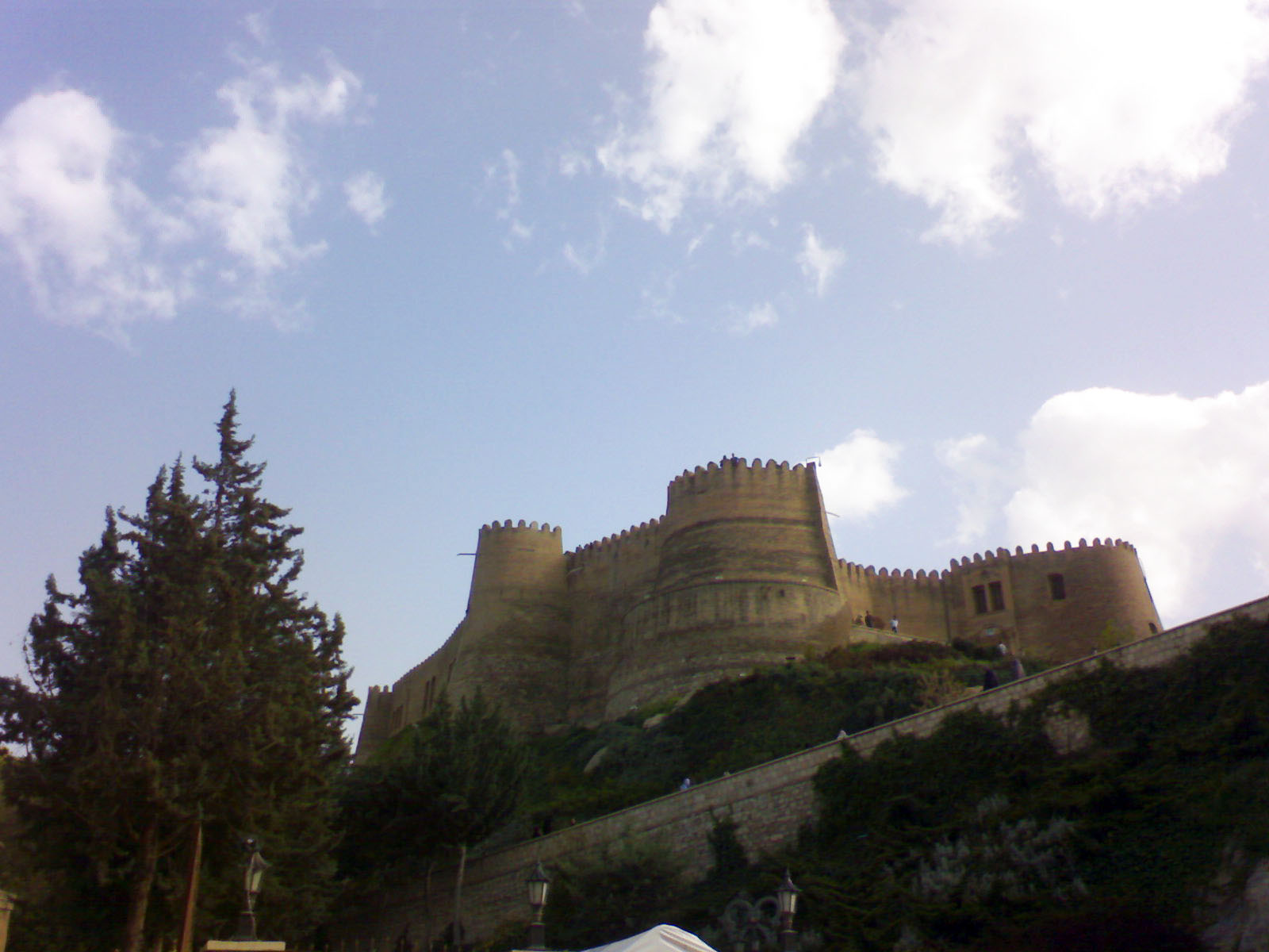 قلعه فلک الافلاک در مرکز شهر خرم آباد